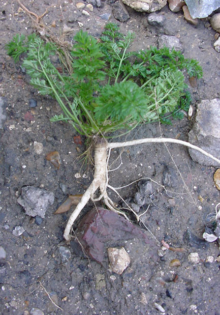 fr Photos prise à la décrue, après l'inondation record de l'Aa (niveau record dépassé de 40 cm), début mars 2002 ; Près de l'église, au centre de Blendecques en aval de Arques, Cette carotte sauvage est encore maintenue par ses radicelles, mais le sol dans lequel elle poussait a été totalement emporté.